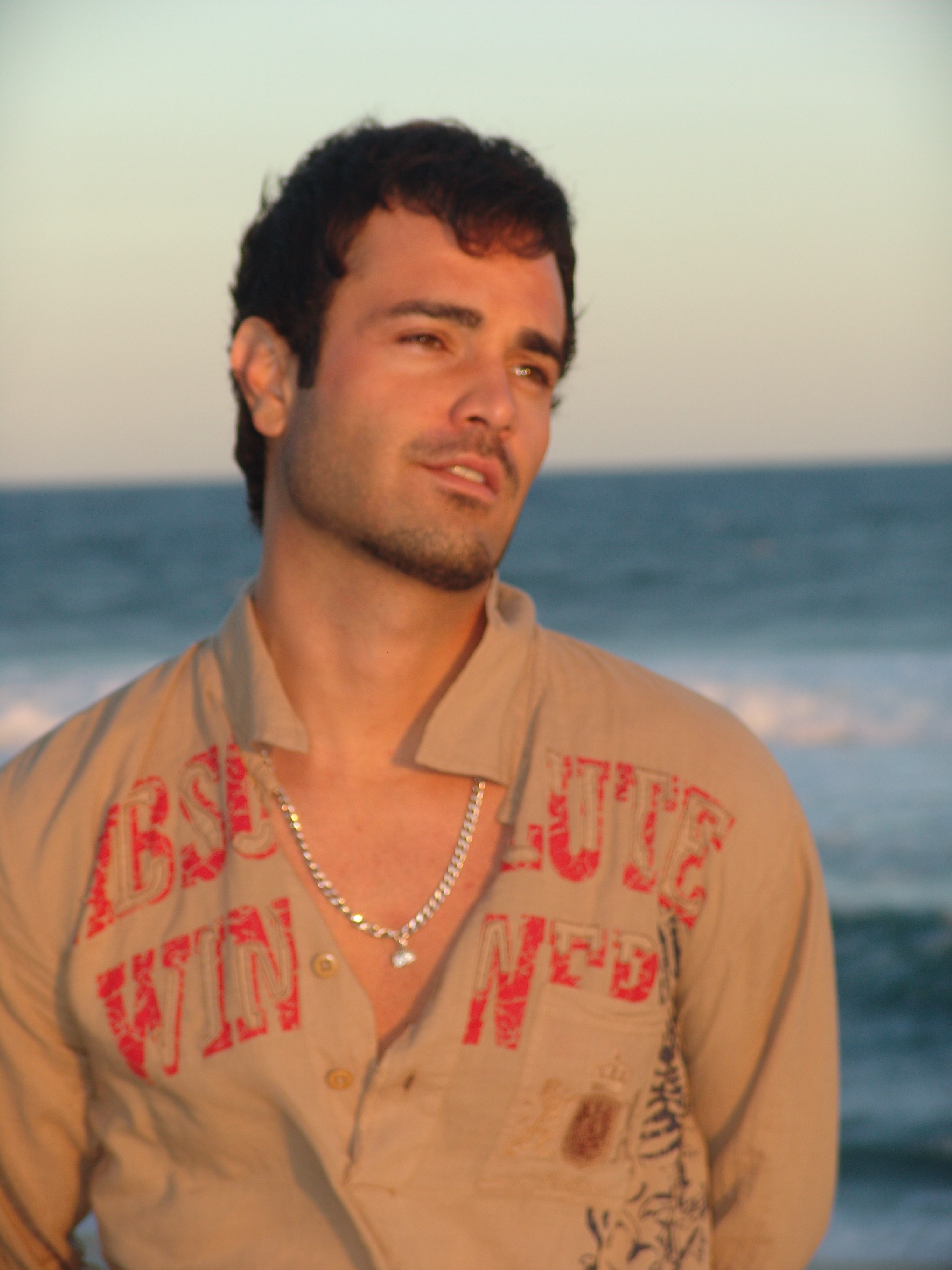 Rodrigo Phavanello actor